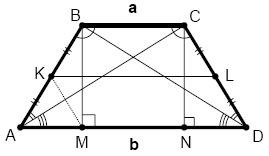 Isosceles trapezoid.